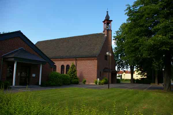 St. Paulus in Beghausen